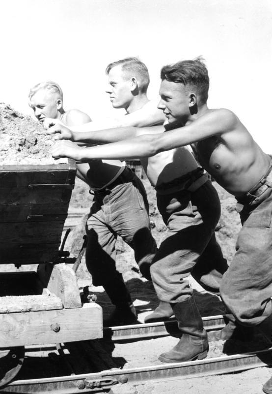 Arbeitsdienst beim Strassenbau